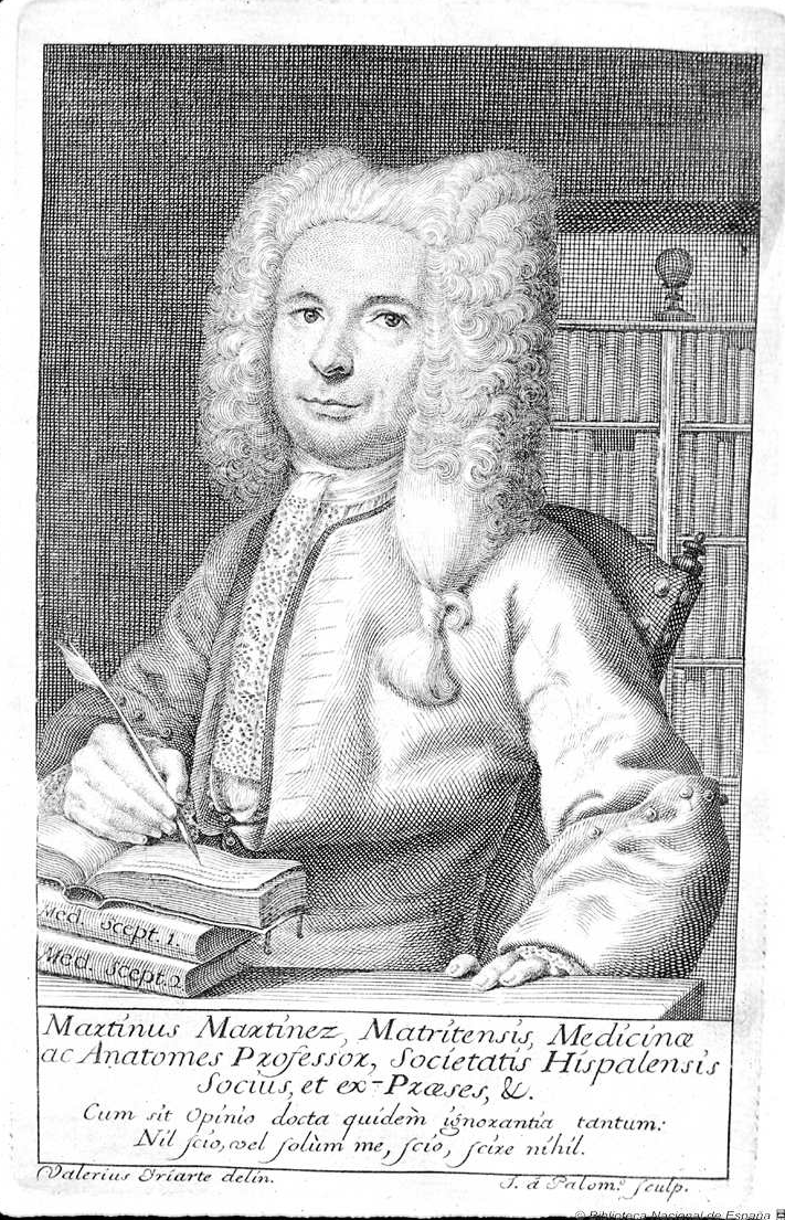 Martín Martínez, aguafuerte firmado "Valerius Iriarte delin. J. a. Palomº sculp", Madrid, Biblioteca Nacional de España